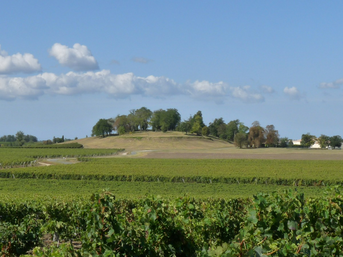 Ancien site de Blaignan (château), Gironde, France